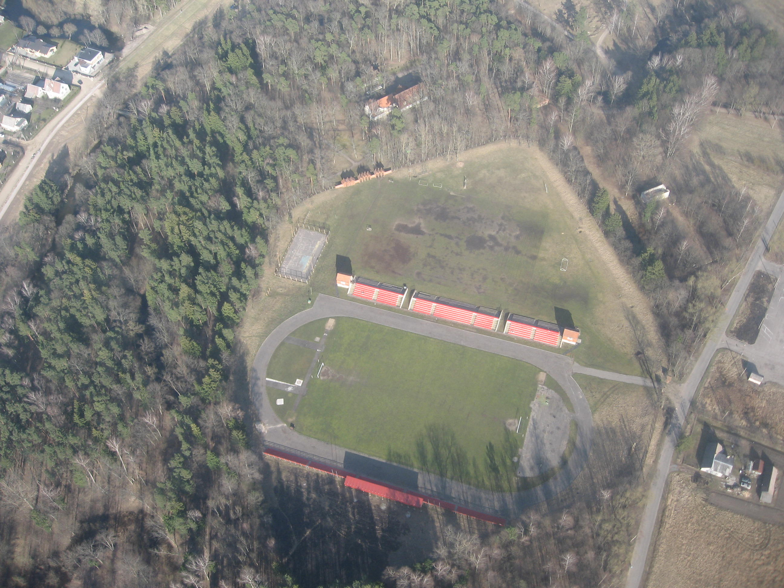 Šilutės stadionas